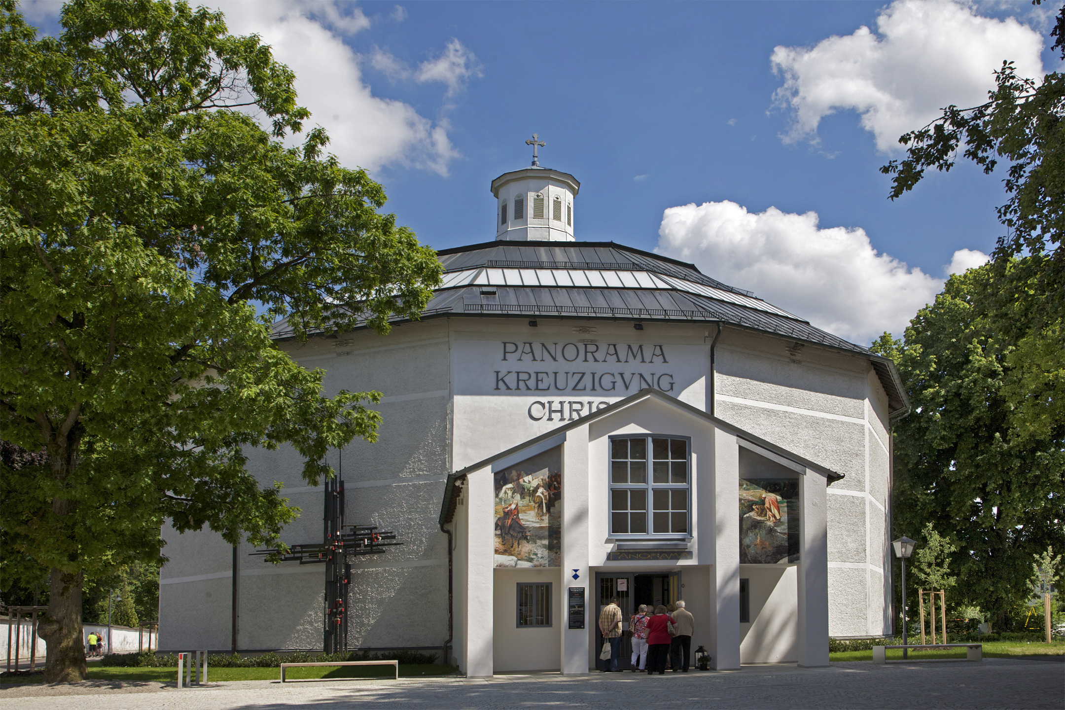 Panorama Kreuzigung Christi, Museum in Altötting, Bayern